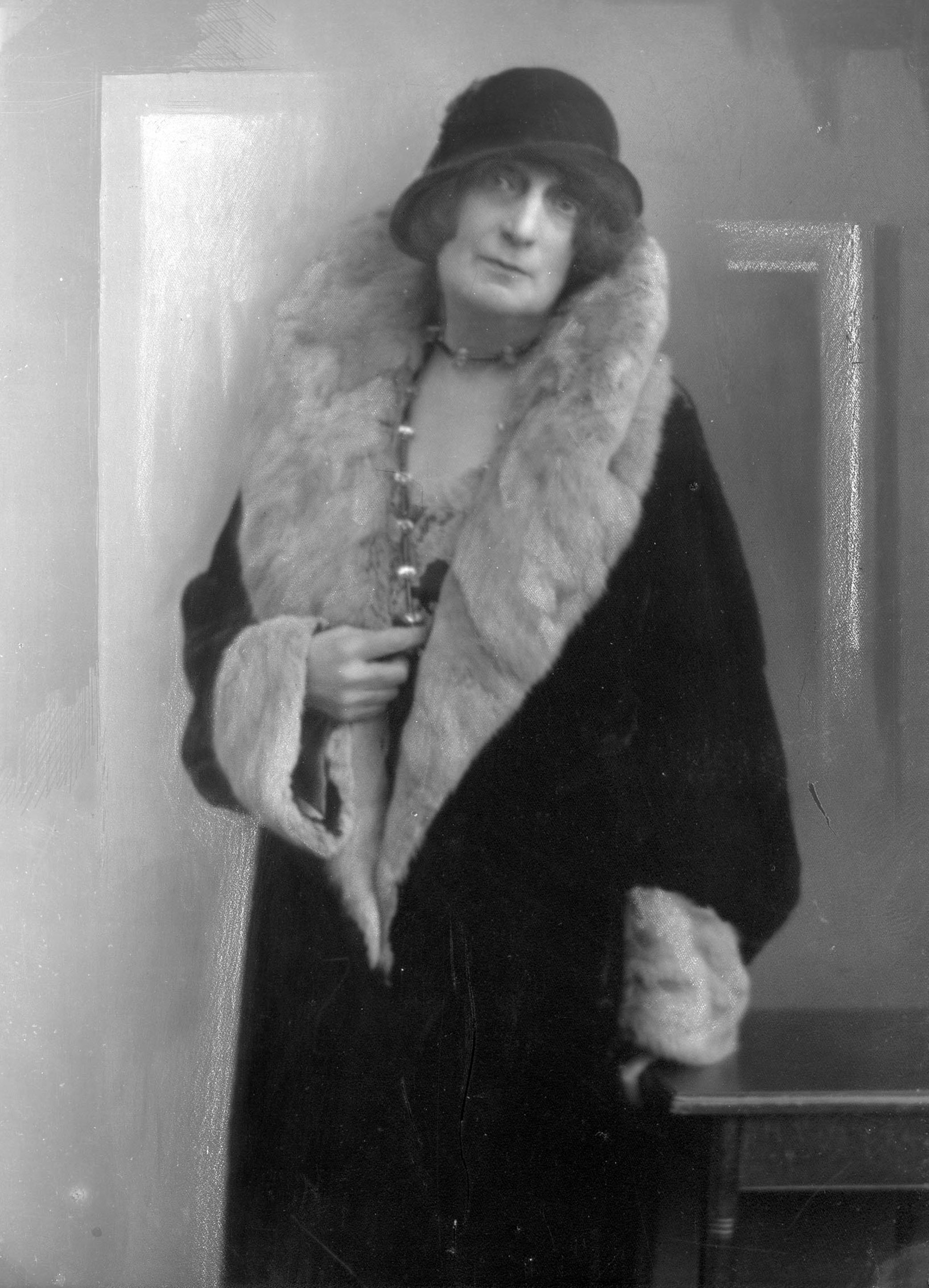 portrait